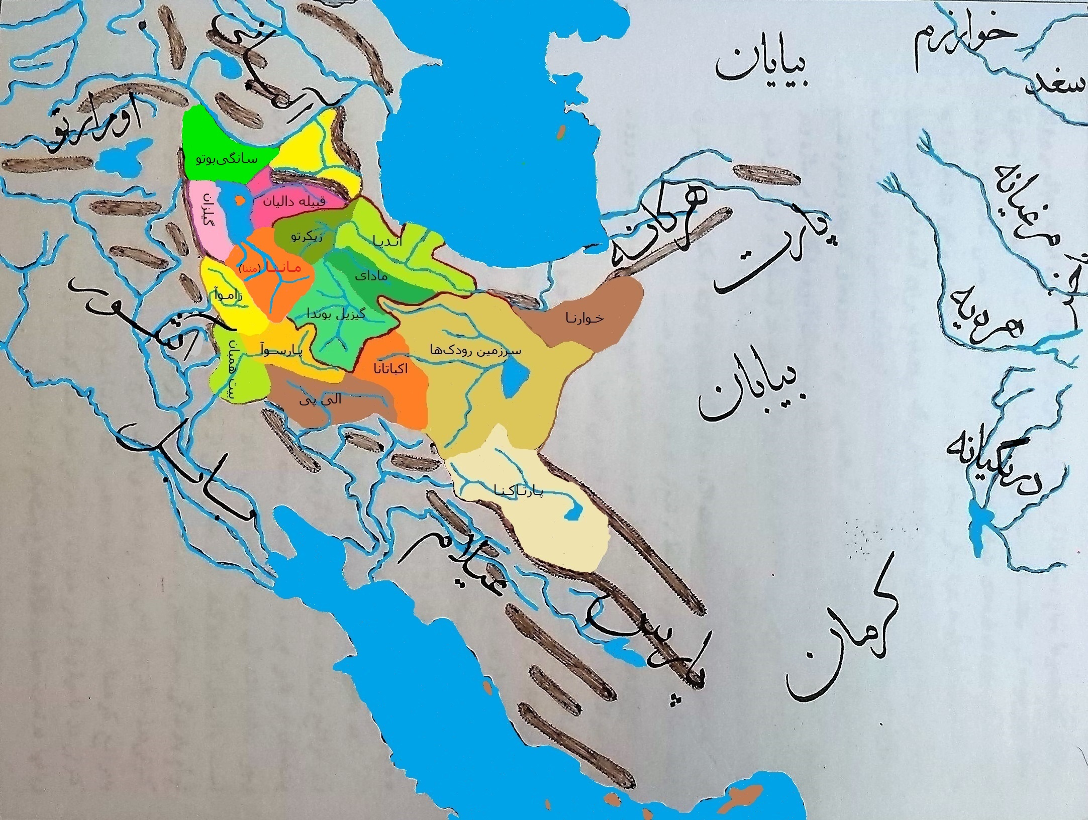 نقشه سرزمین قبایل ماننا پیش از پادشاهی ماد